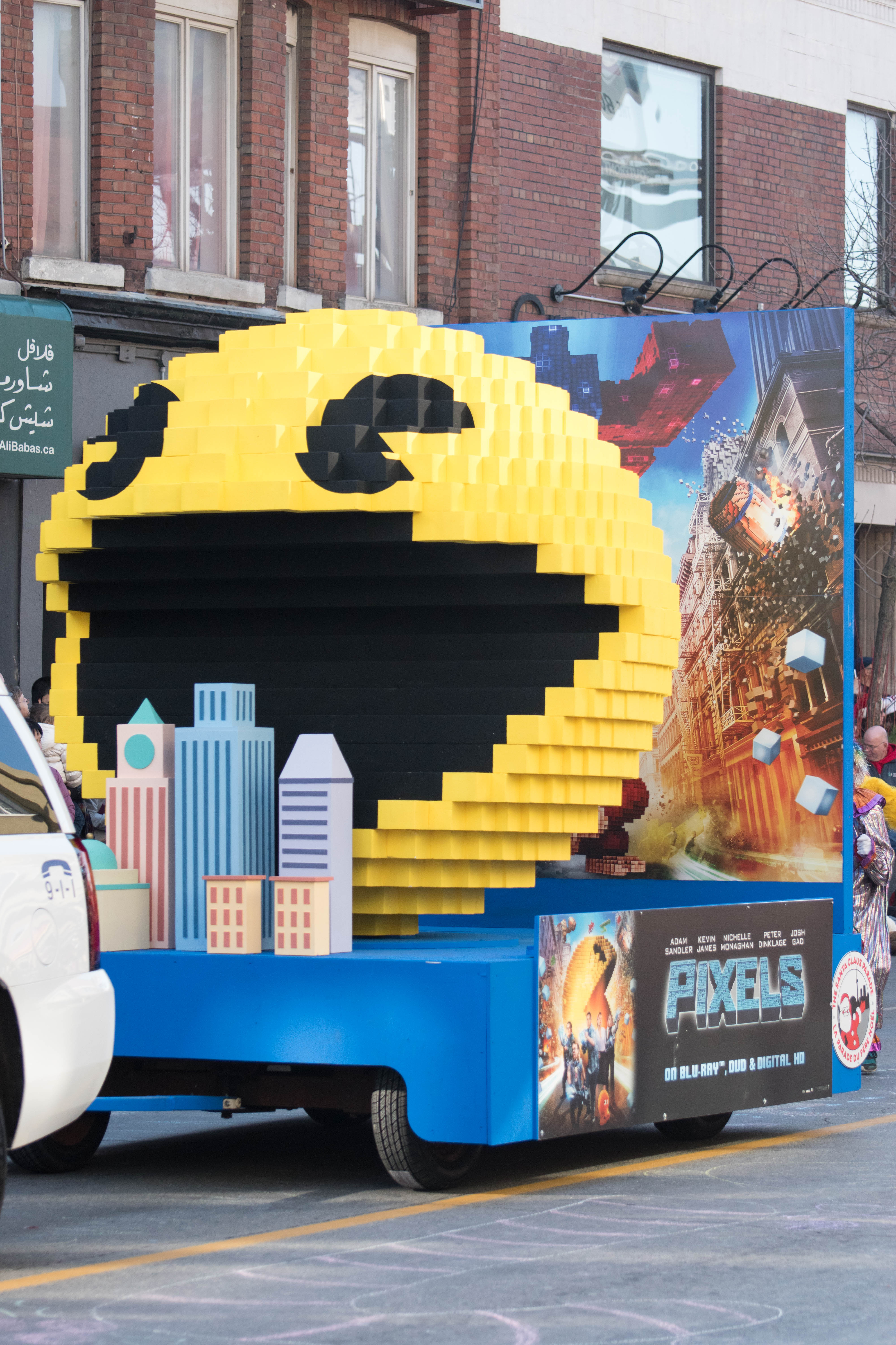 Santa Claus Parade (Toronto)